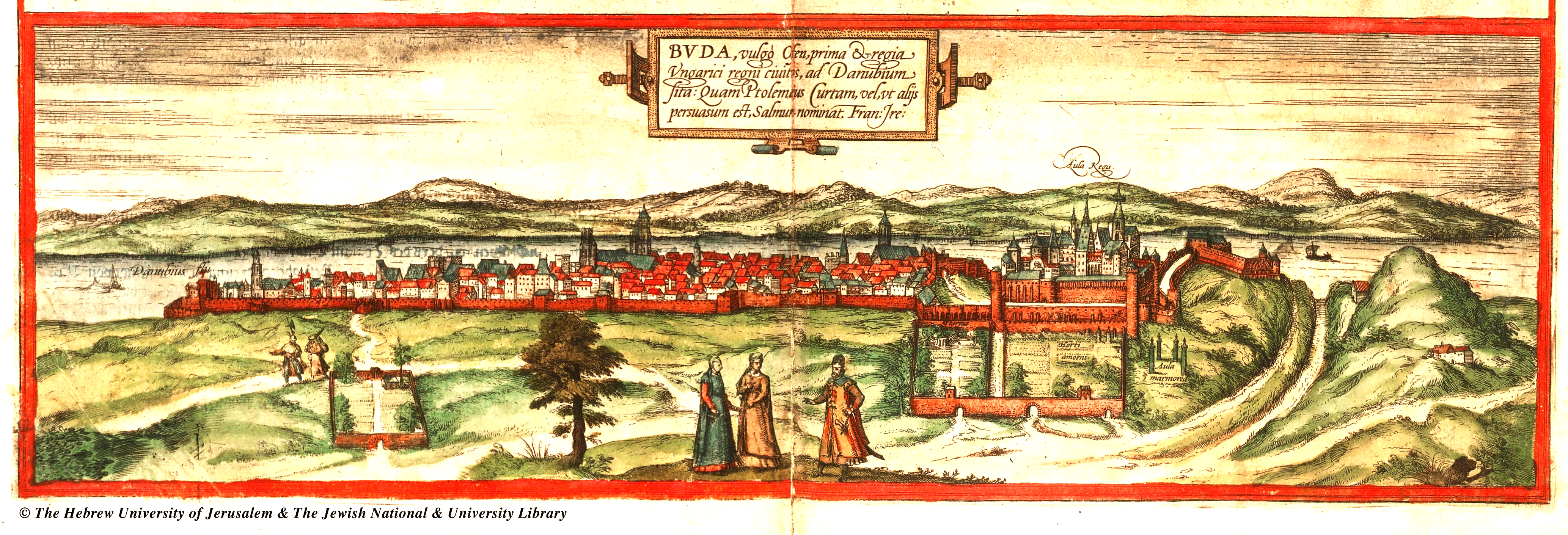 Holzstich der Festung Buda in der Zeit der Belagerung von Buda 1541